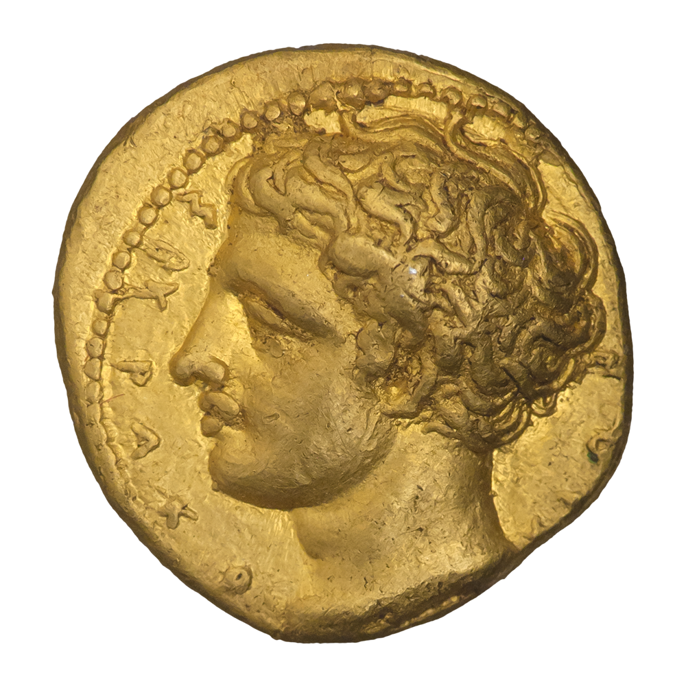 Сицилия. Сиракузы. Вторая демократия. Дионисий I (405—395 гг. до н.э.). Золотой тетробол (50 литр). Аверс. Надпись ΣΥΡΑΚΟΣΙΩΝ. Голова бога Анапоса, влево.